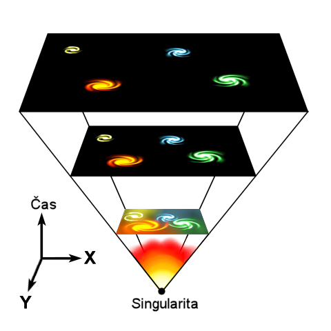 Podľa teórie Veľkého tresku vznikol vesmír z nekonečne hustej singularity. Vesmír sa s postupom času rozpína, čím sa objekty od seba vzďaľujú. Táto ilustrácia ukazuje abstraktné "rezy" priestorom v rôznych časových bodoch. Je značne zjednodušená, pretože zobrazuje len 2 dimenzie, aby sa dala pohodlne zobraziť aj časová os. Ako sa vesmír rozpína, galaxie a iné objekty sa od seba vzďaľujú, avšak ony samé sa nezväčšujú, pretože sú držané pokope gravitáciou. Copyright: Permission is granted to copy, distribute and/or modify this document under the terms of the GNU Free Documentation License, Version 1.2 or any later version published by the Free Software Foundation; with no Invariant Sections, no Front-Cover Texts, and no Back-Cover Texts.